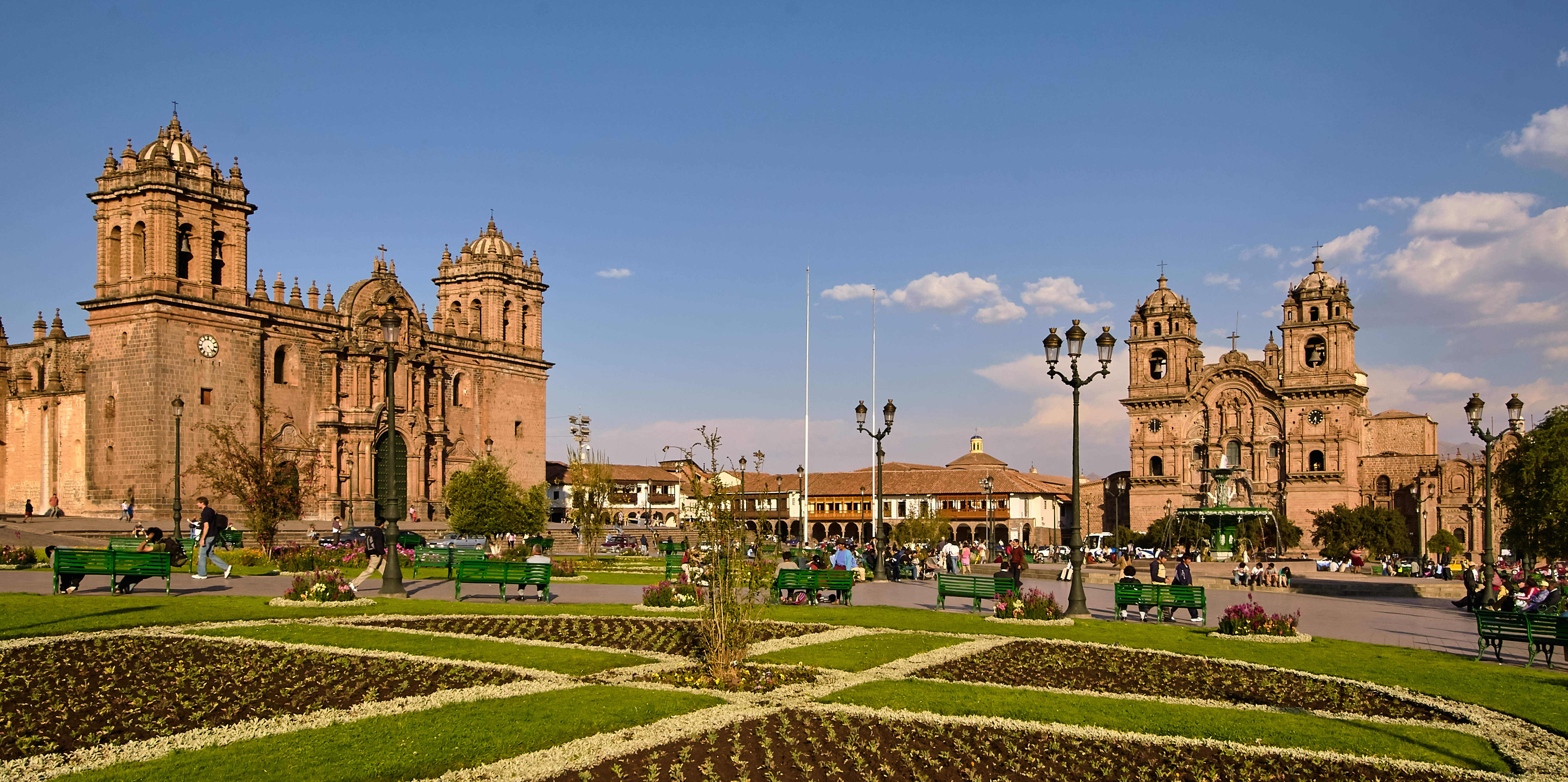 Peru